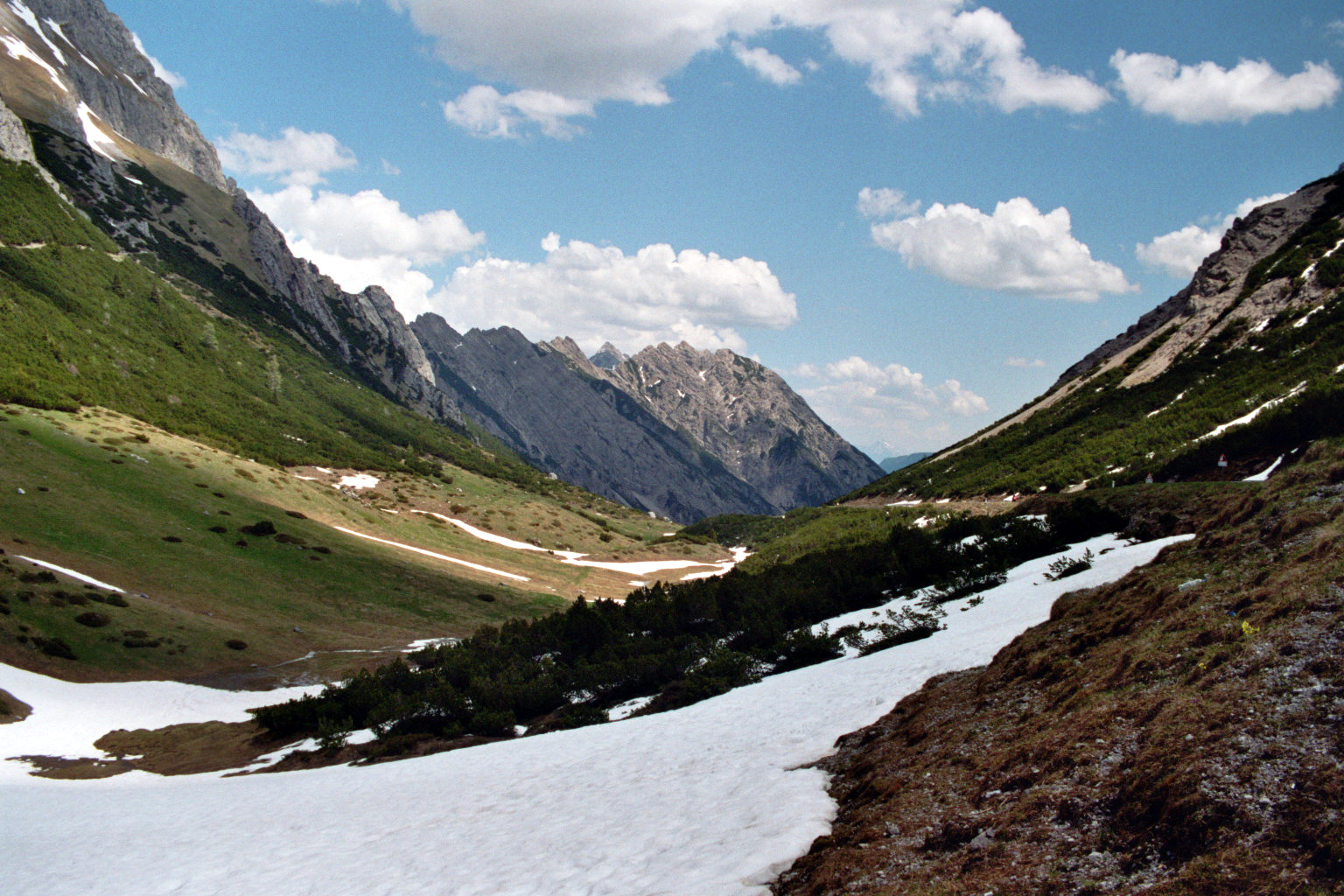 Hahntennjoch in Tirol, Blick von der Passhöhe nach Osten (Standort: etwas unterhalb der Passstraße). Im Hintergrund der Kienberg (2.218 m.ü.A.). Ganz im Hintergrund ist auch der Rauchberg (2.480 m.ü.A.) sichtbar.